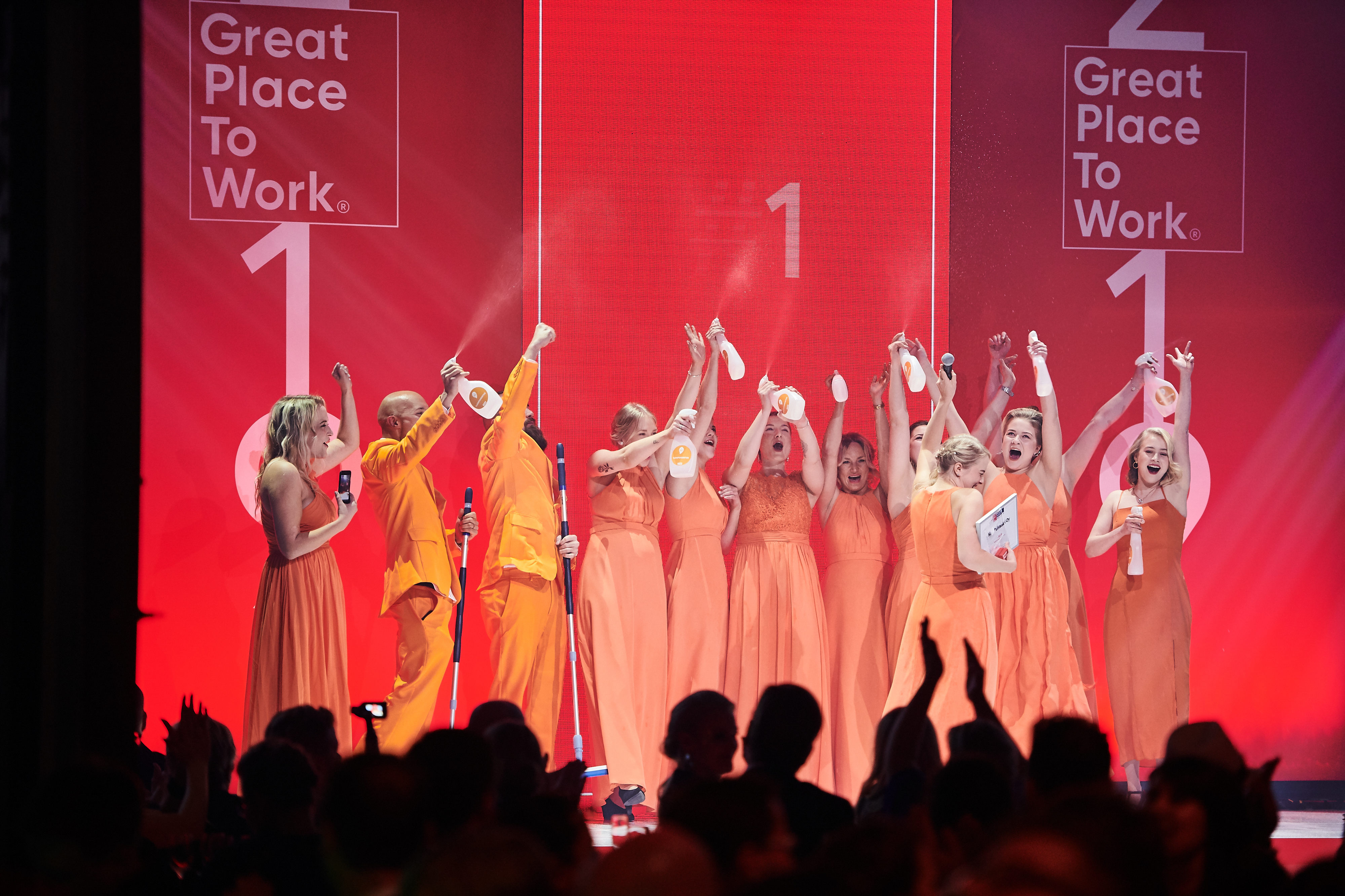 Koti Puhtaaksi Oy palkittiin Suomen parhaana työpaikkana Great Place to Work -gaalassa vuonna 2019. Palkintoa vastaanottamassa 5 siivoavaa sisarusta, kehityspäällikkö Henri Haho ja yrityksen työntekijöitä.